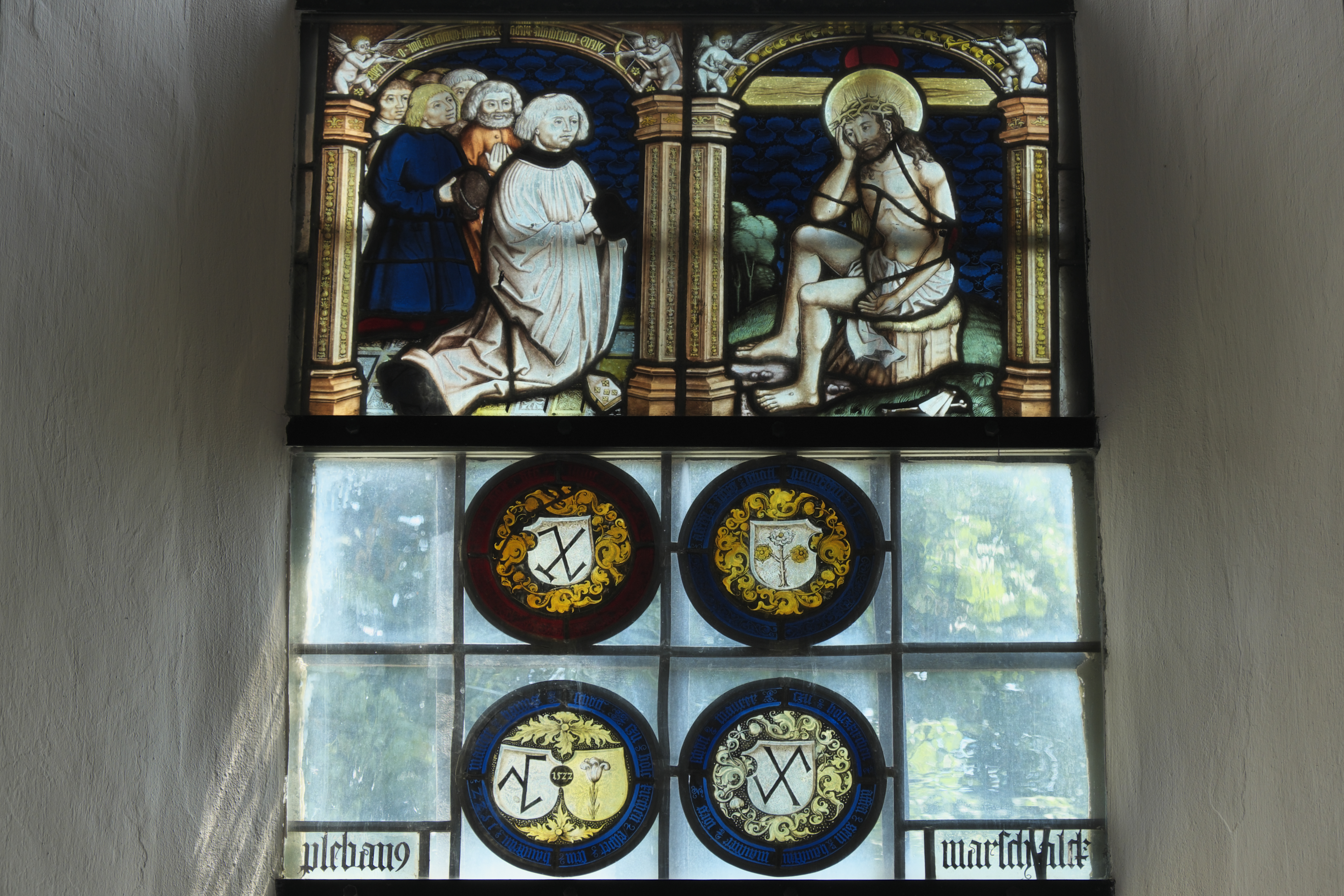 Katholische Filialkirche St. Peter und Paul in Holzkirchen (Alling) im Landkreis Fürstenfeldbruck (Bayern/Deutschland), Bleiglasfenster mit der Jahreszahl 1522; Darstellung: Christus in der Rast, Rundscheiben mit Handwerkermarken